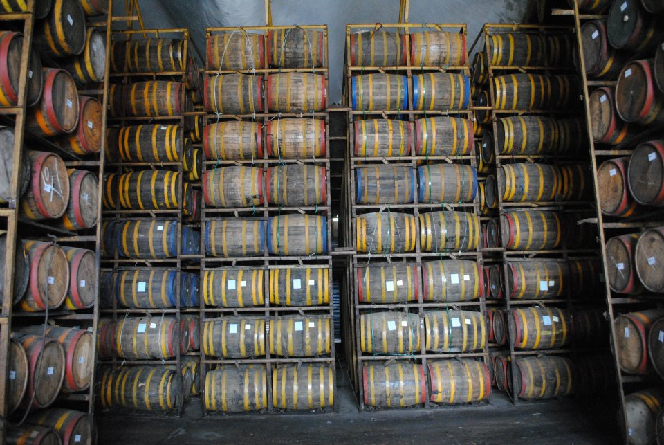 Barricas de la planta de envejecimiento de Puerto Plata